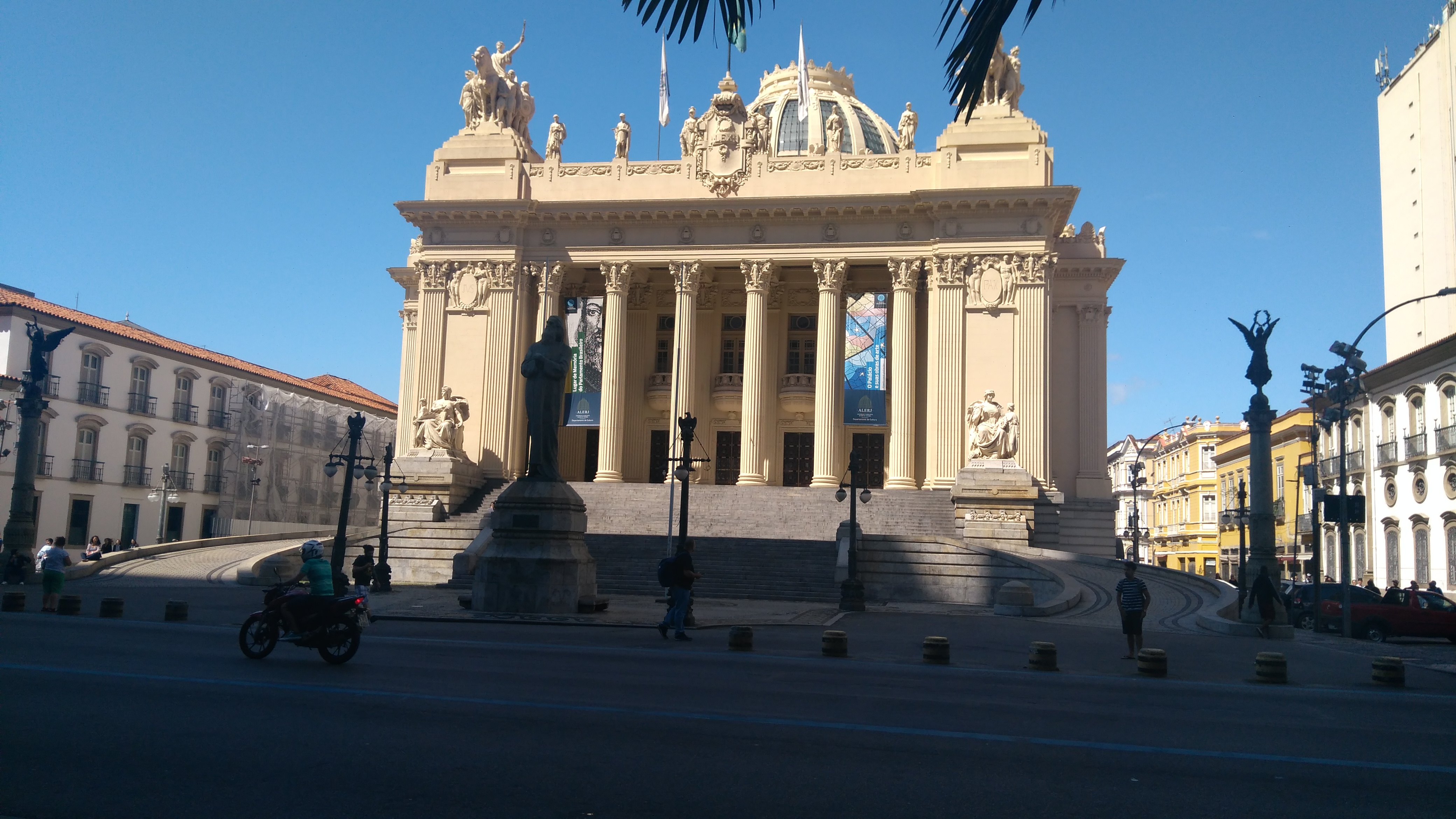 Palácio Tiradentes - Rio de Janeiro - Brasil